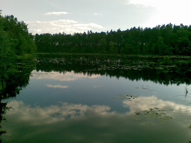 Allikajärv Perakülas Nõva vallas Läänemaal.